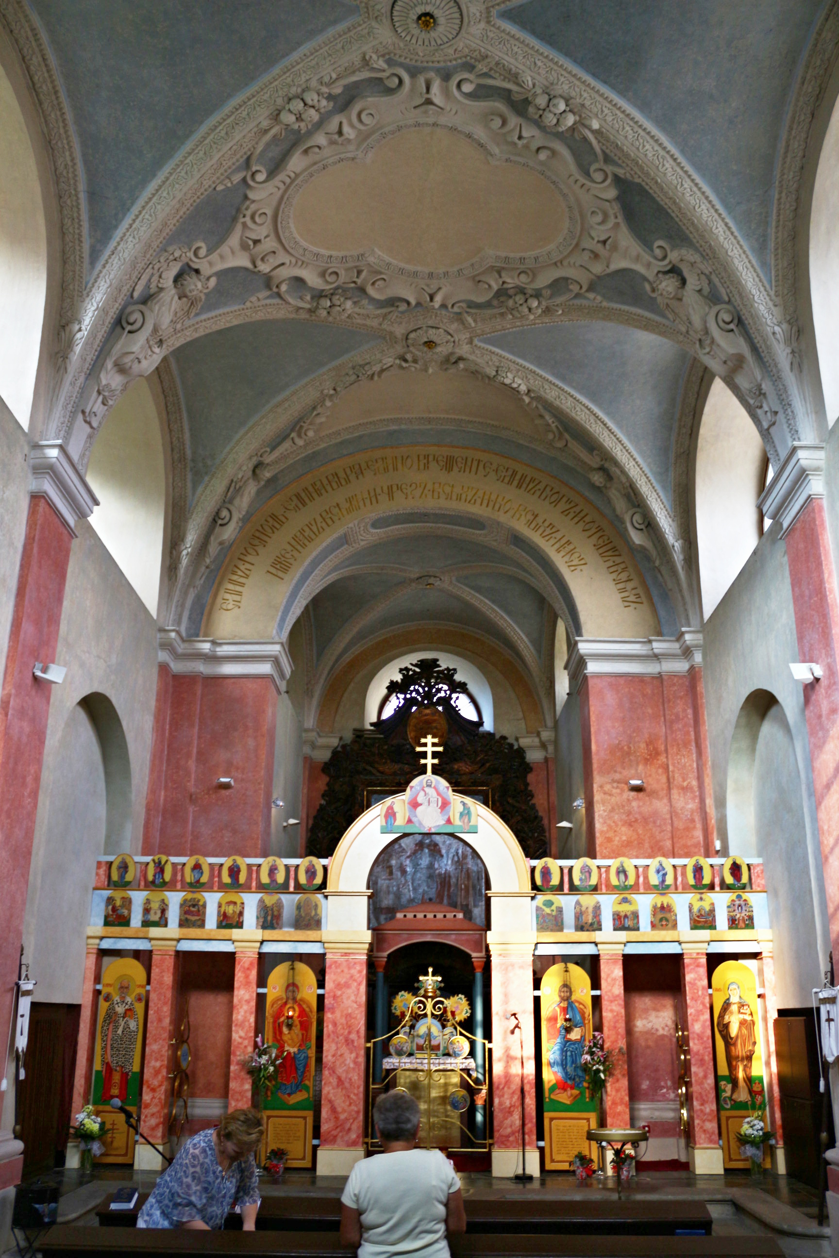 Chrám svatých Kosmy a Damiána v Emauzském klášteře, Praha